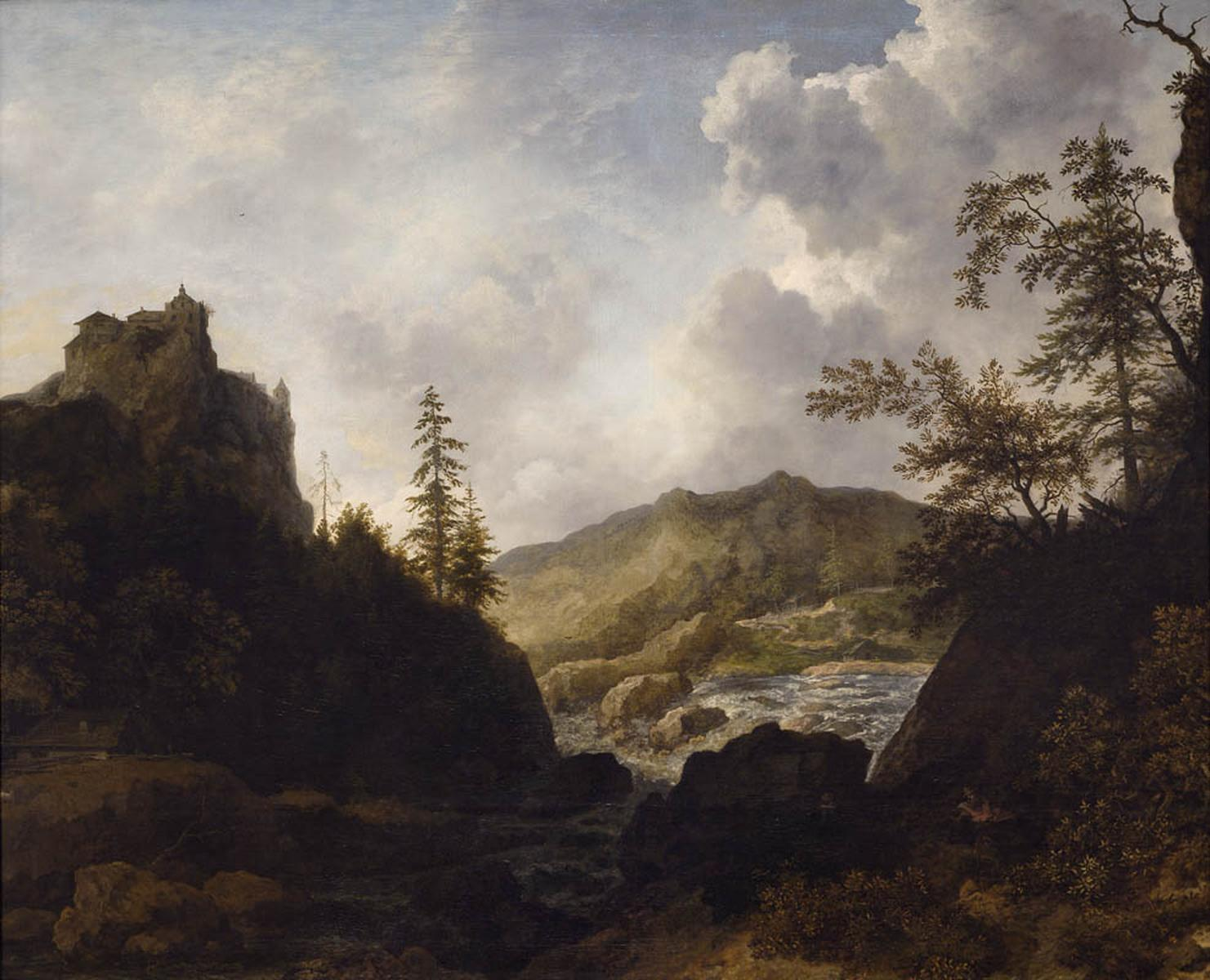 Paysage nordique avec un château sur une colline; Paysage de Norvège (autre titre)